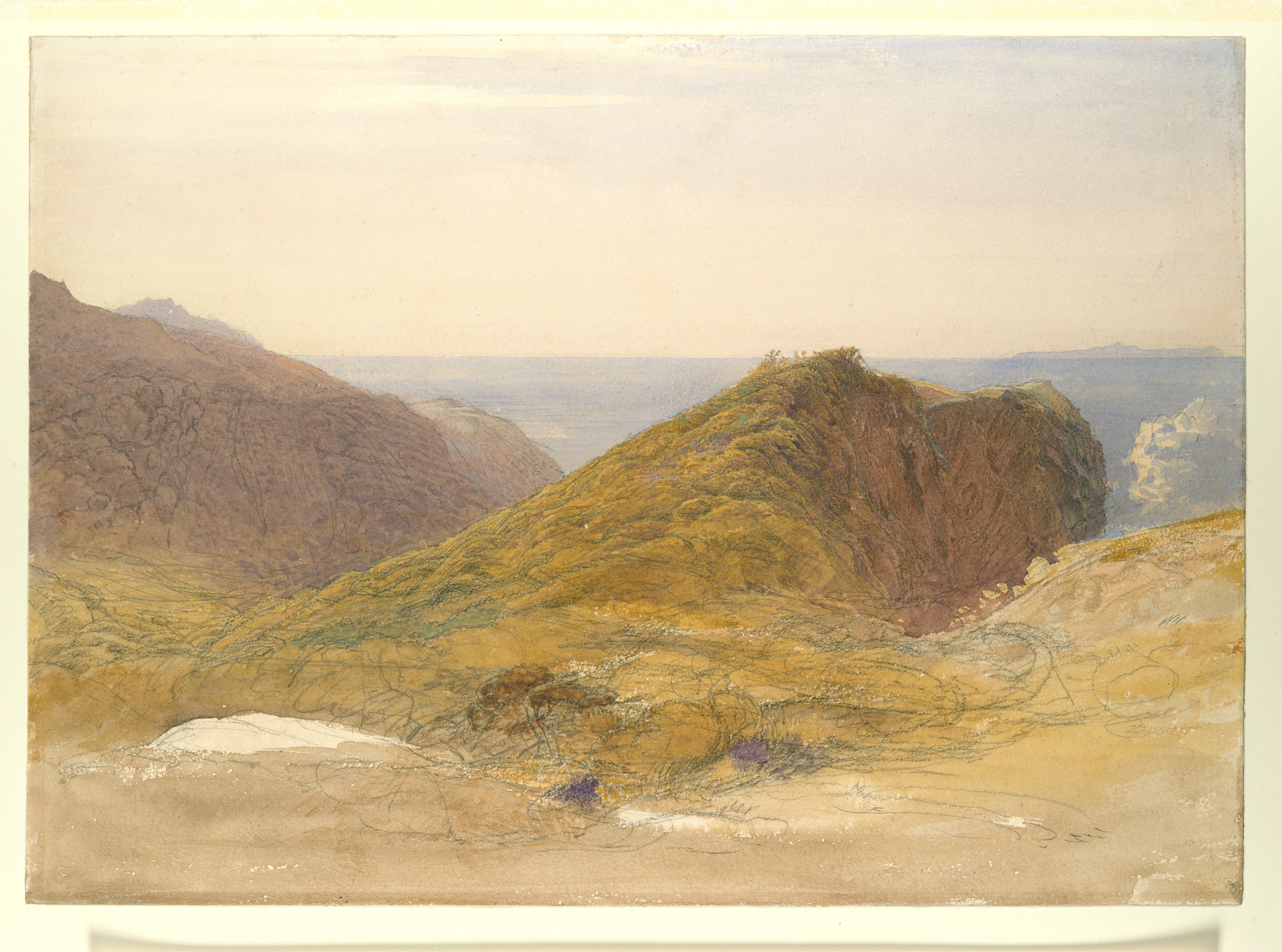 Drawing; Drawings